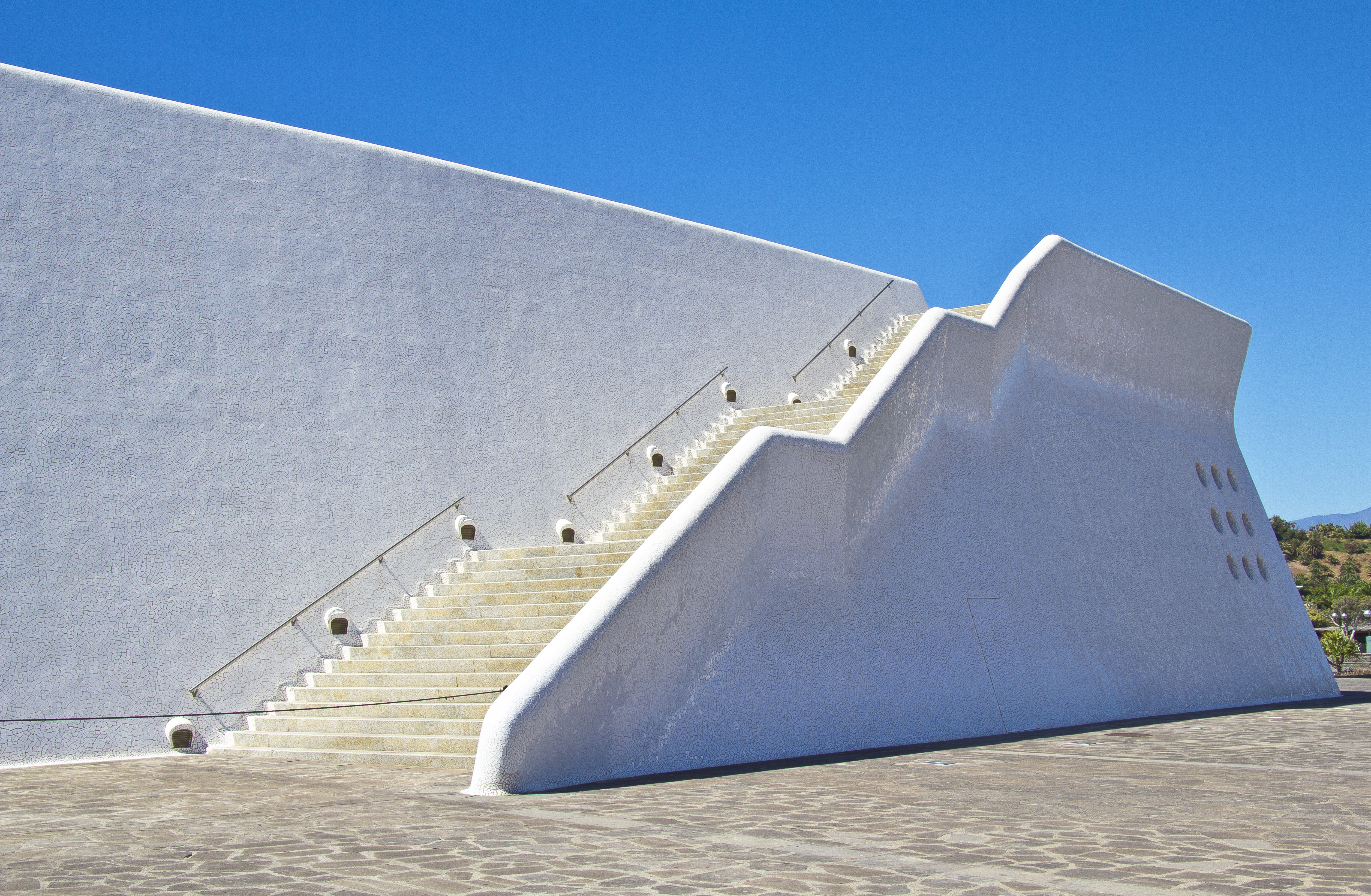 Auditorio de Tenerife „Adán Martín“ in Santa Cruz de Tenerife, Detail auf der Nordseite